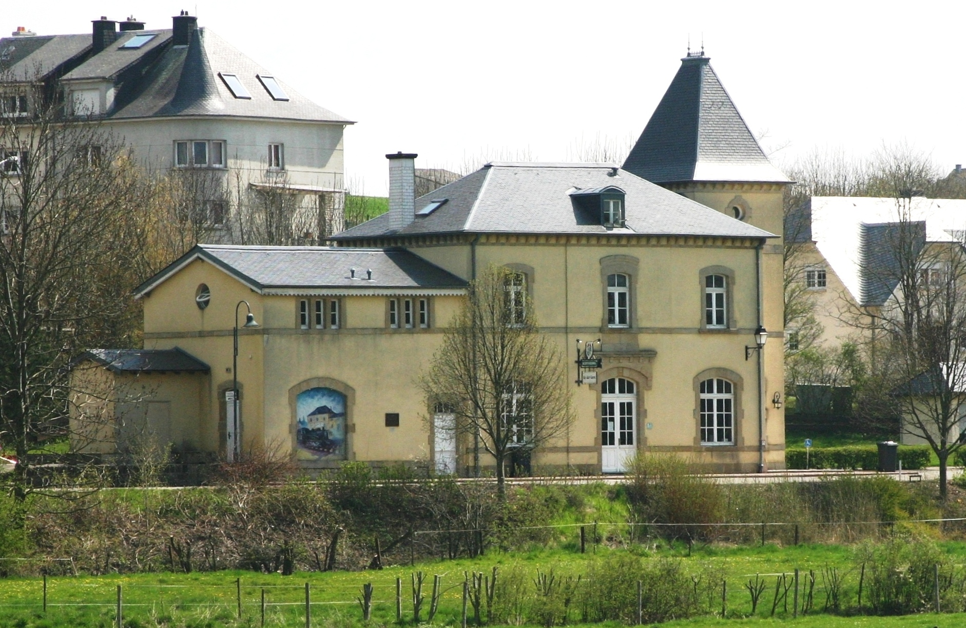 D'Gare vu Kënzeg 2008.